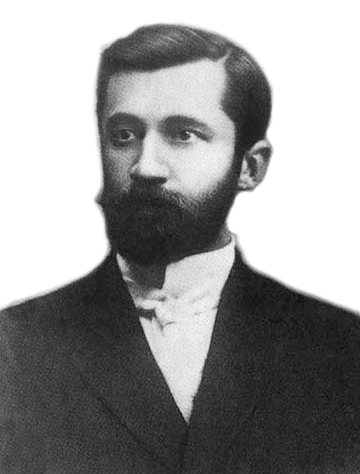 Маркеллин Алексеевич Олесницкий